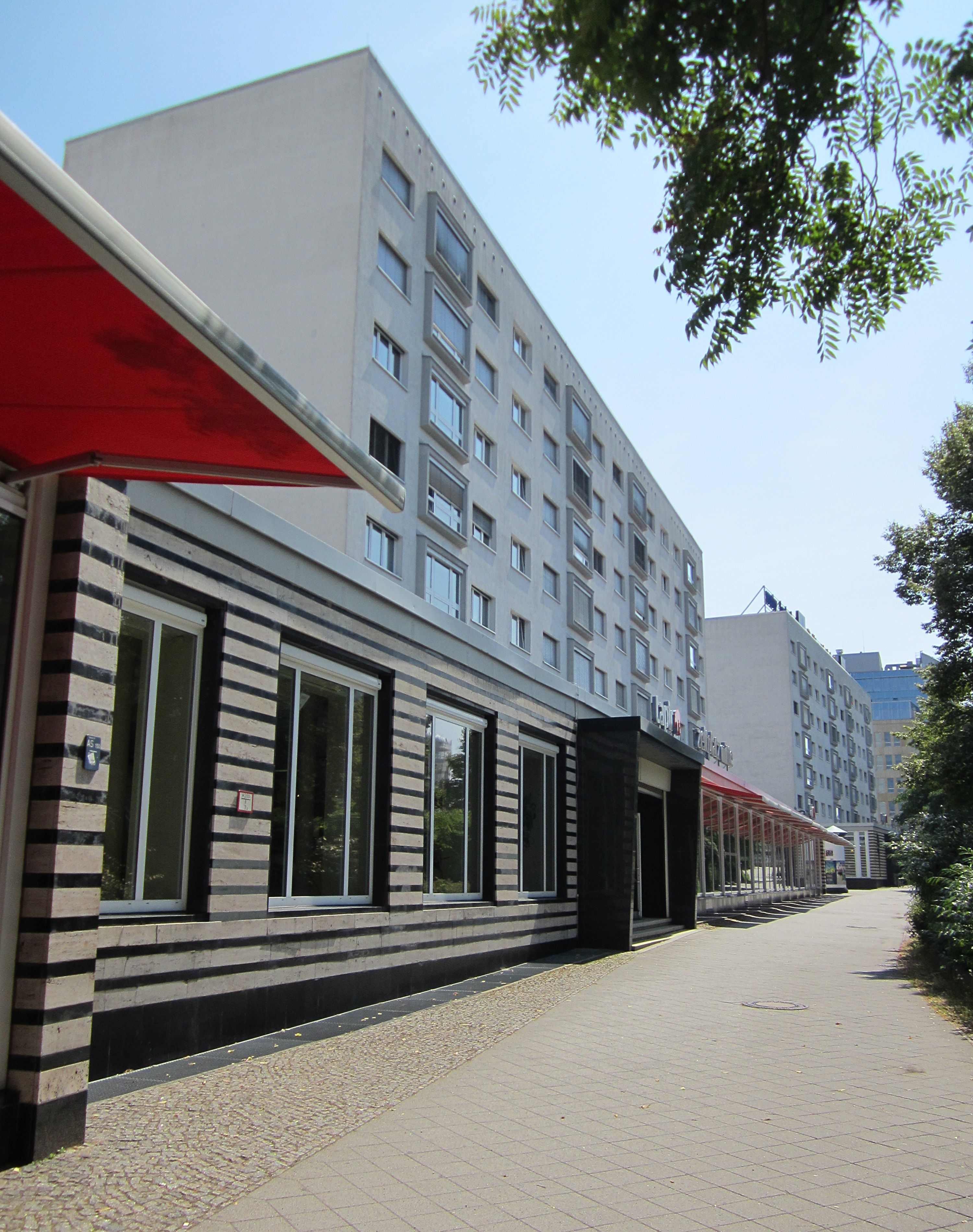 Leipzig, Fassaden am Georgiring